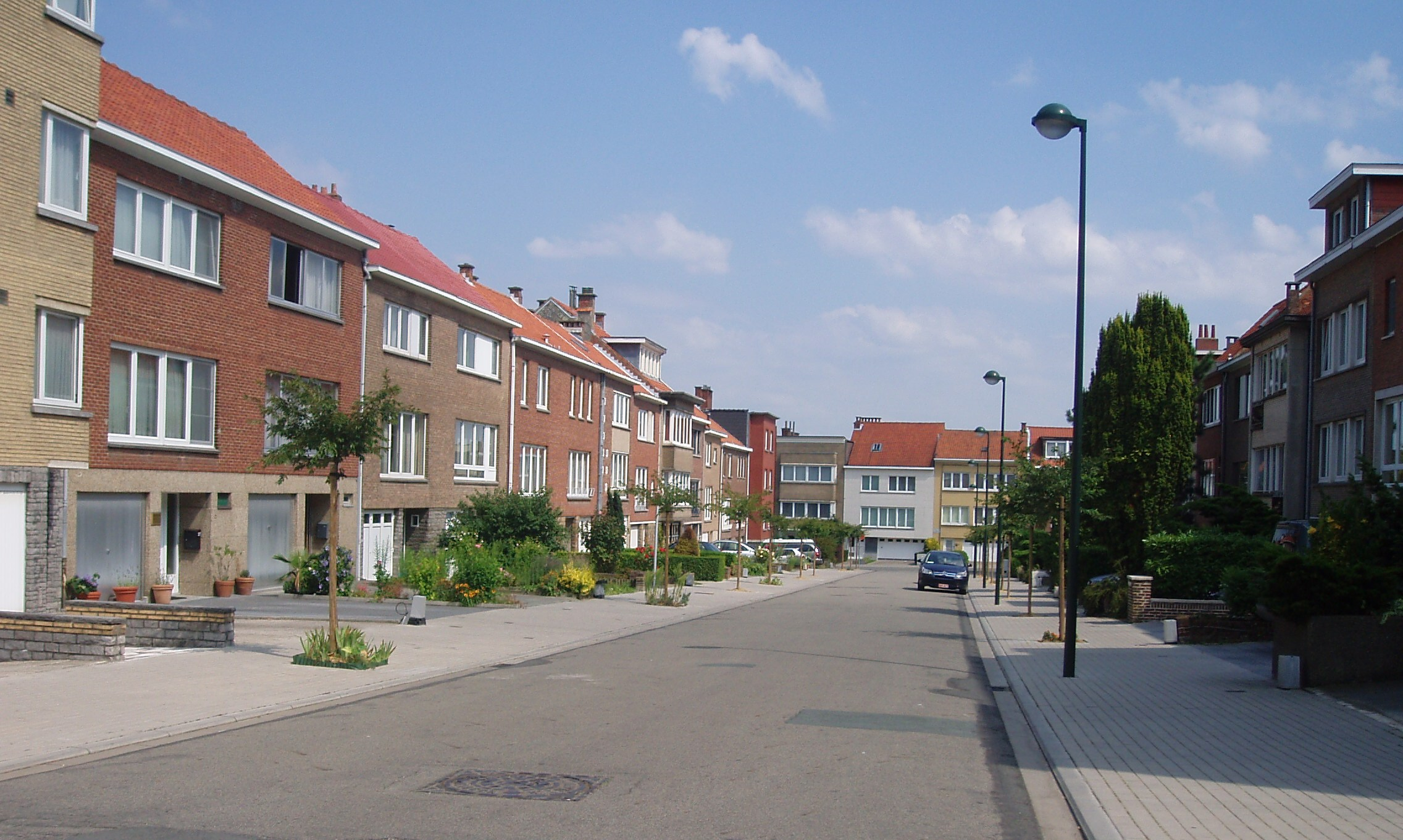 Rue Léon Houyoux Auderghem Belgium